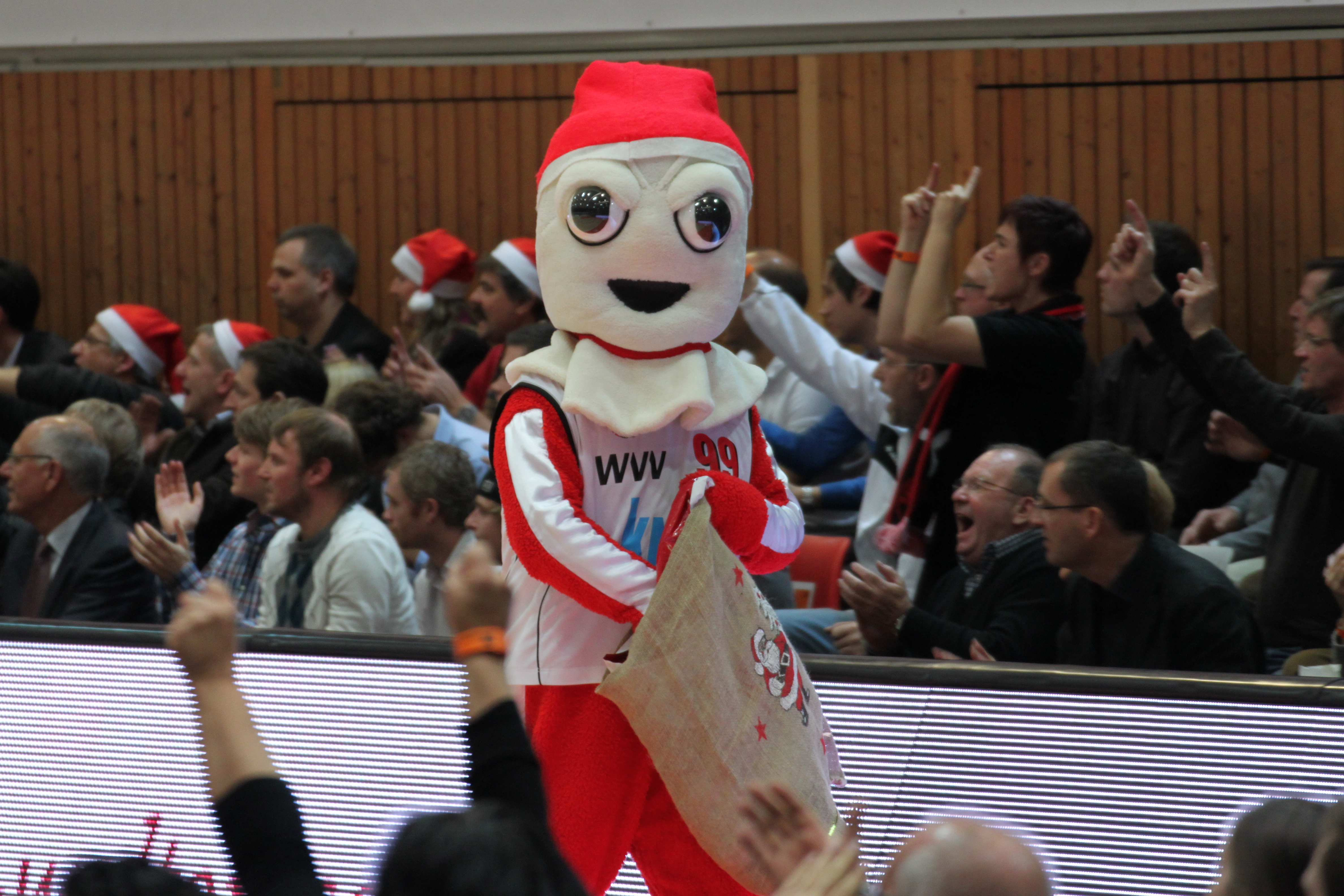 Olli das Maskottchen des S.Oliver Baskets